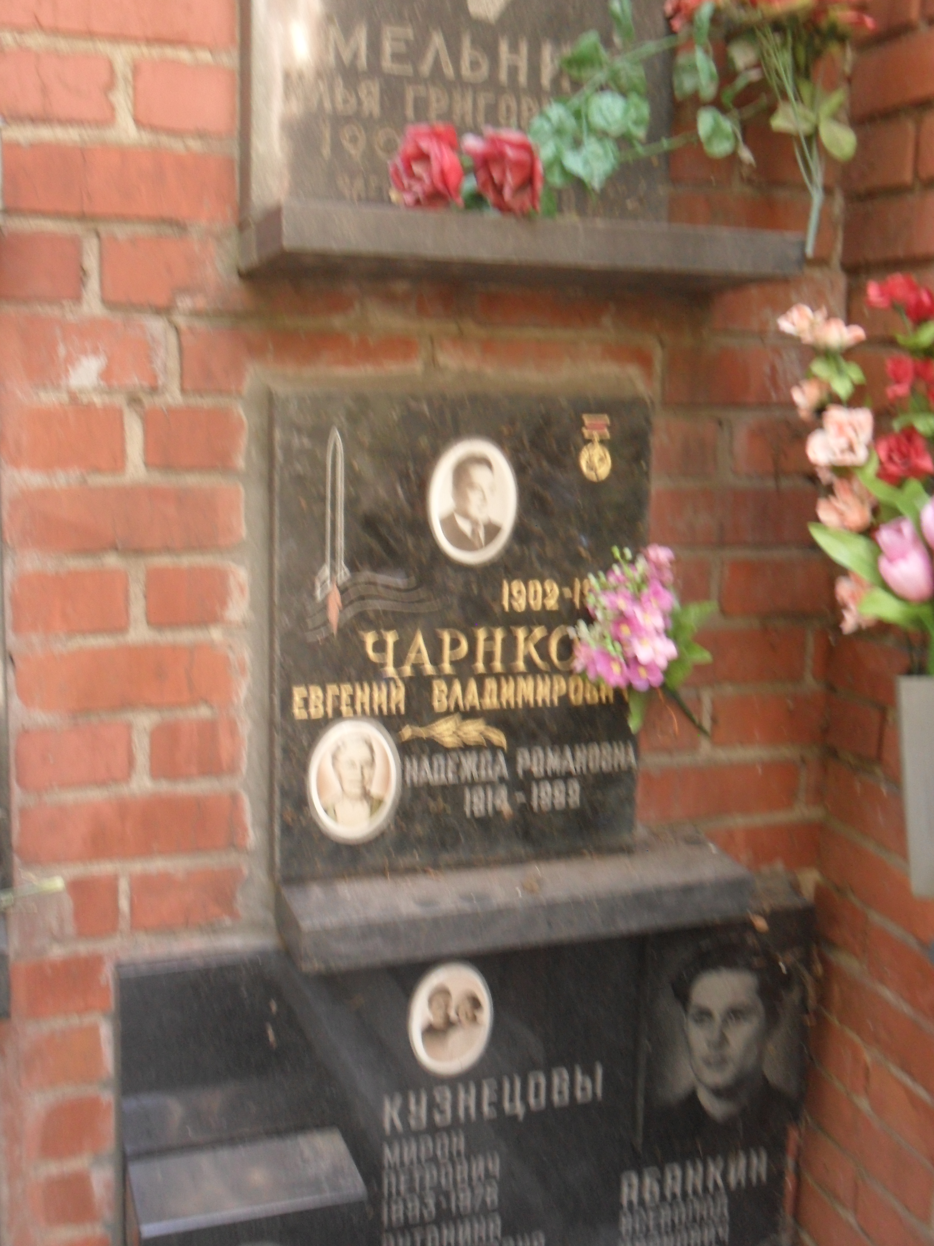 Плита колумбария конструктора Евгения Чарнко на Новодевичьем кладбище Москвы.